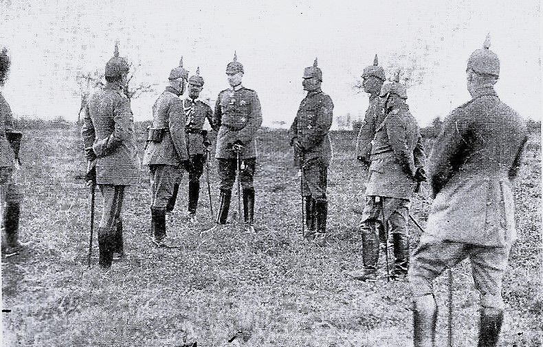 Großherzog im Gespräch mit Oberst Graf v. d. Goltz, Kdr. 34. I. B. Gen. Heintzke, GdI v. Quast, Stengel, GM, Kdr. 17. I. D., Oberst Sydow Stabschef